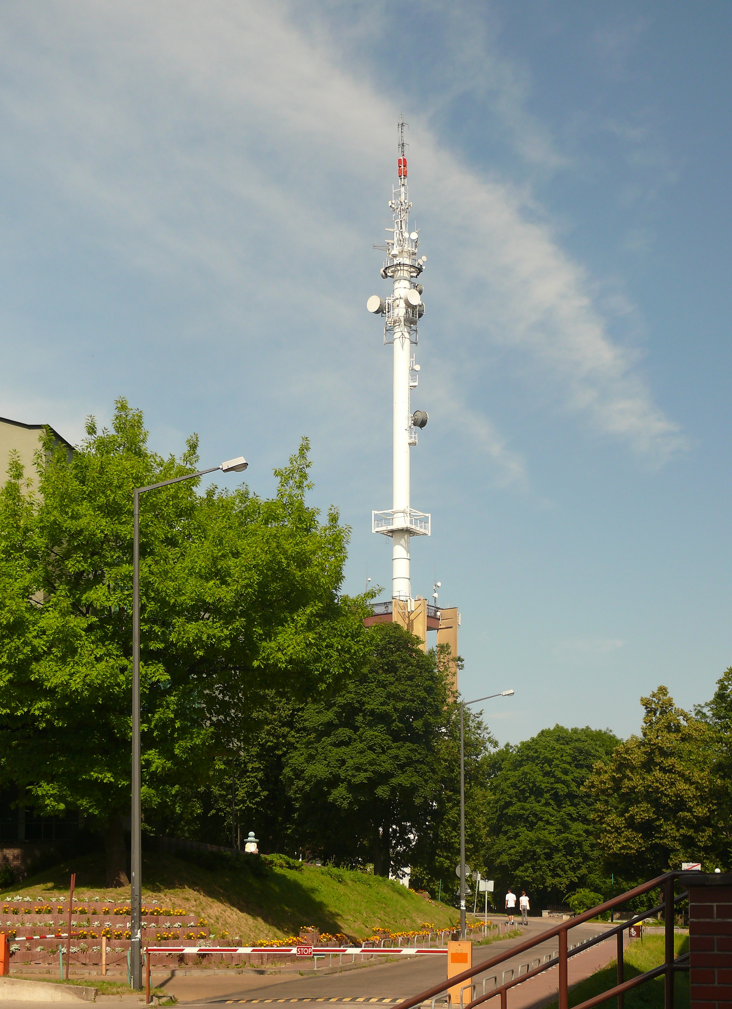 Wieża nadajnika radiowo-telewizyjnego Polskiego Radia w Lublinie